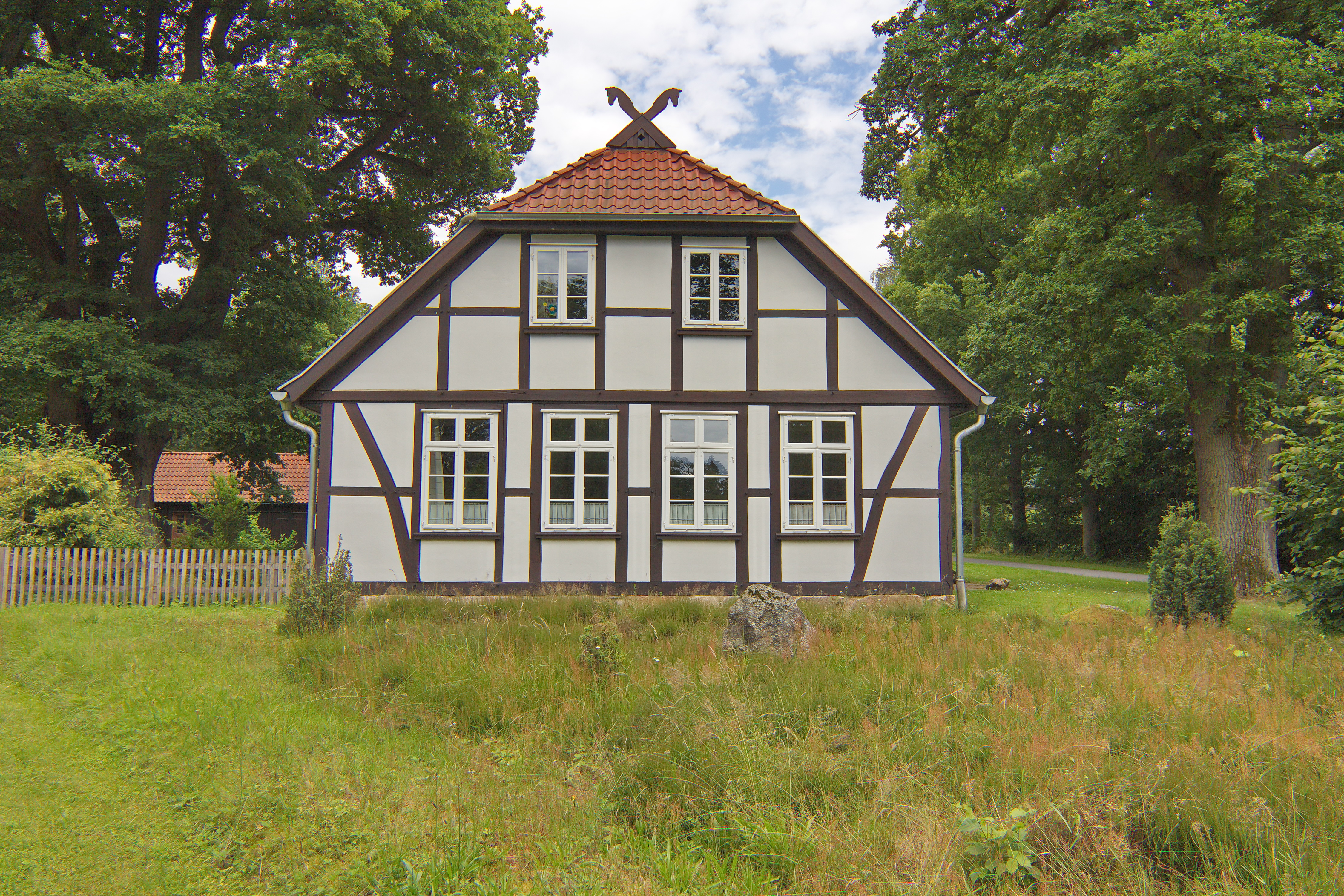 Marwede in Scharnhorst (Eschede), Niedersachsen, Deutschland